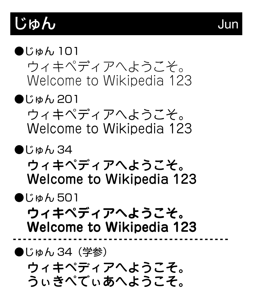 じゅん（フォント）の書体見本